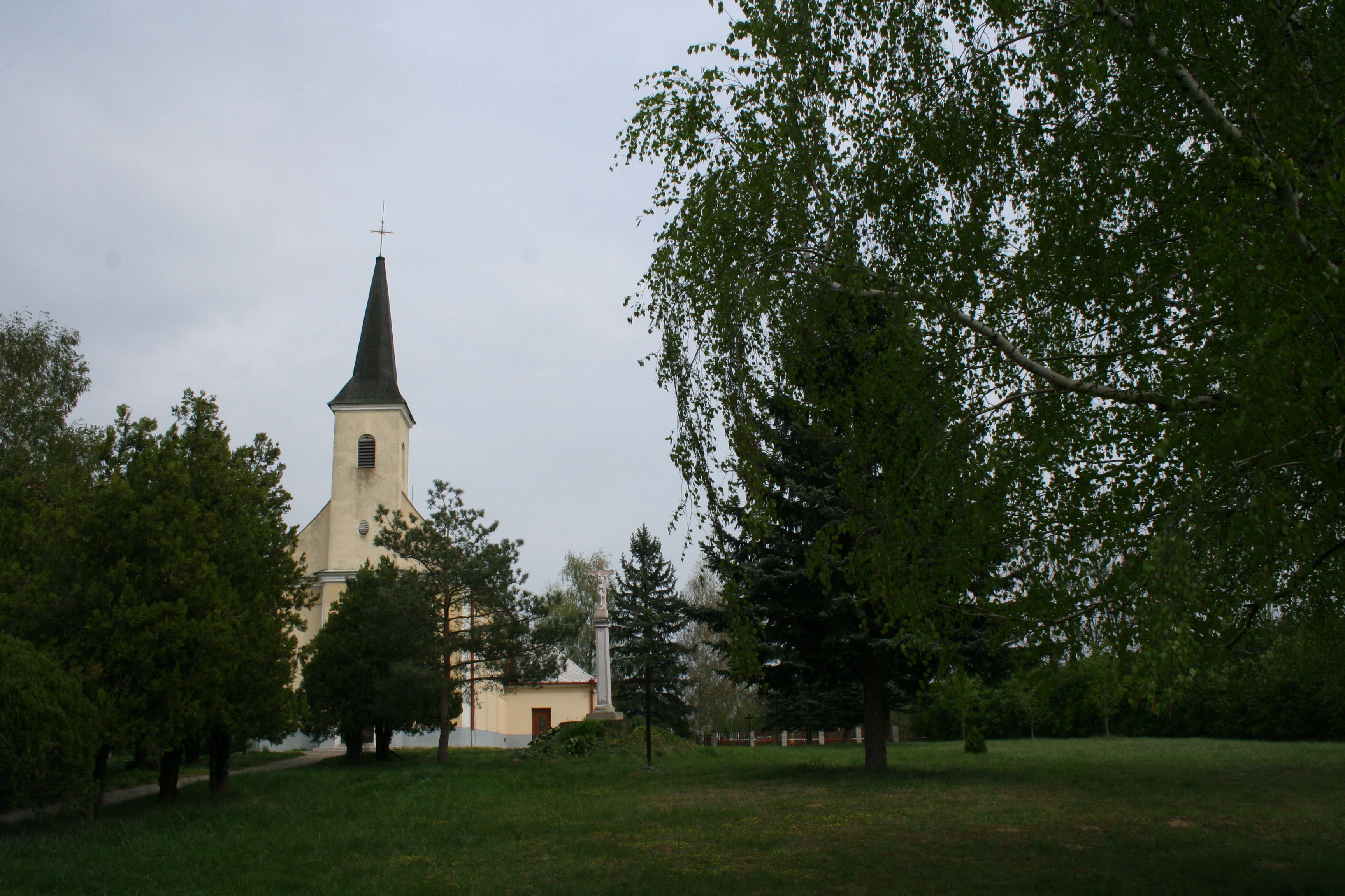 Valkház